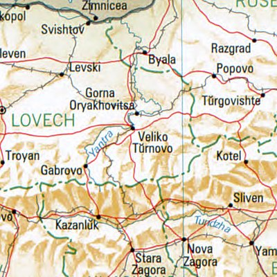 Weliko Tarnowo - Lage des Ortes in Bulgarien